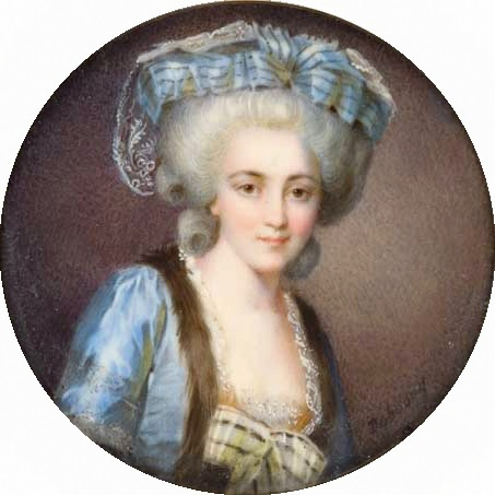 Portret Marii Teresy z Poniatowskich Tyszkiewiczowej